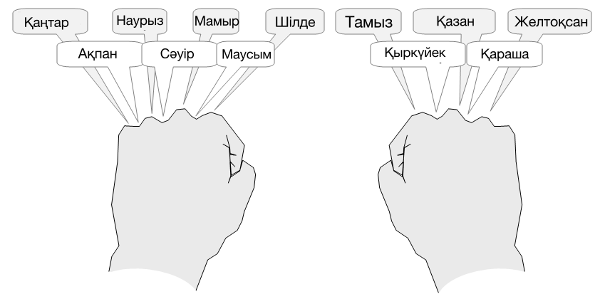 Қазақша (кирил): Ай күндерін жұдырықтармен санау, 30 күн бе әлде 31 күн бе?